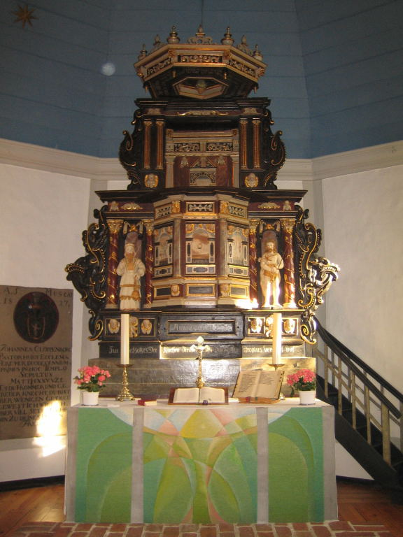 Altar in der St. Salvatoris-Kirche zu Geesthacht